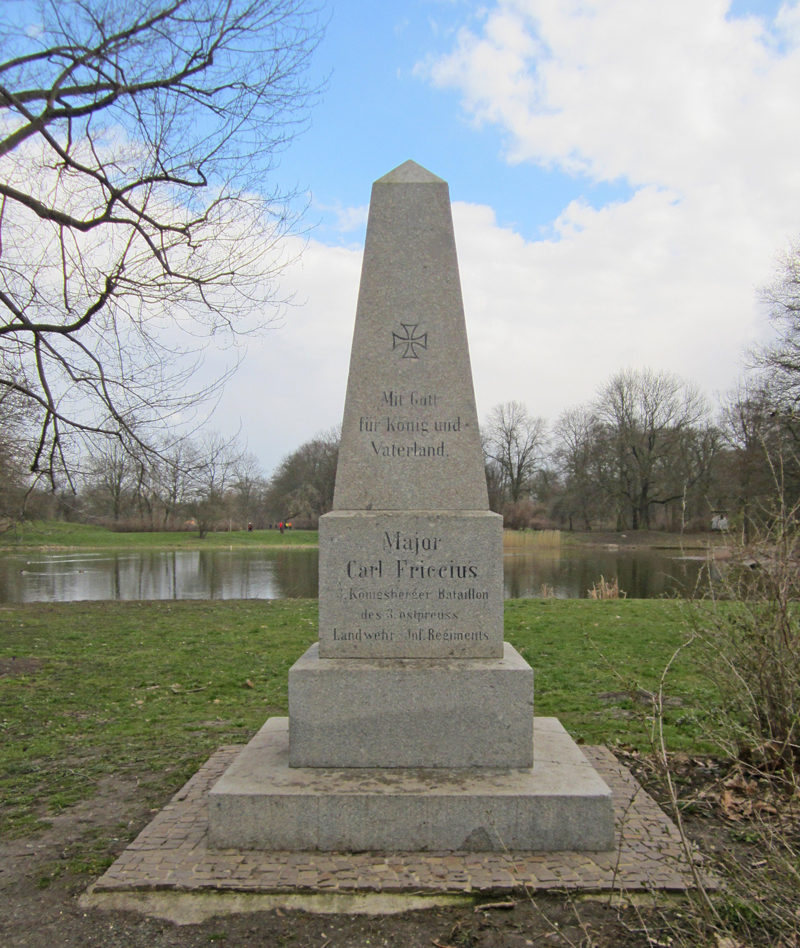 Apelstein 43 in Leipzig-Stünz; Denkmalbeschreibung: Apelstein Nr. 43 (V); im Volkshain Sellerhausen-Stünz, Gedenkstein zur Erinnerung an die Kämpfe der Völkerschlacht bei Leipzig 1813, Major Carl Friccus 18./19. Oktober 1813, geschichtlich von Bedeutung.